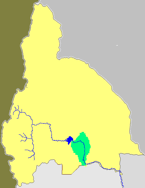 Mapa de la provincia de San Juan Argentina donde se observa un mancha verde, esa misma nos muestra la superficie que ocupa el oasis agrícola del Valle del Tulúm. Mientras que las líneas celestes el Río San Juan, y la mancha celeste el Embalse Ullúm